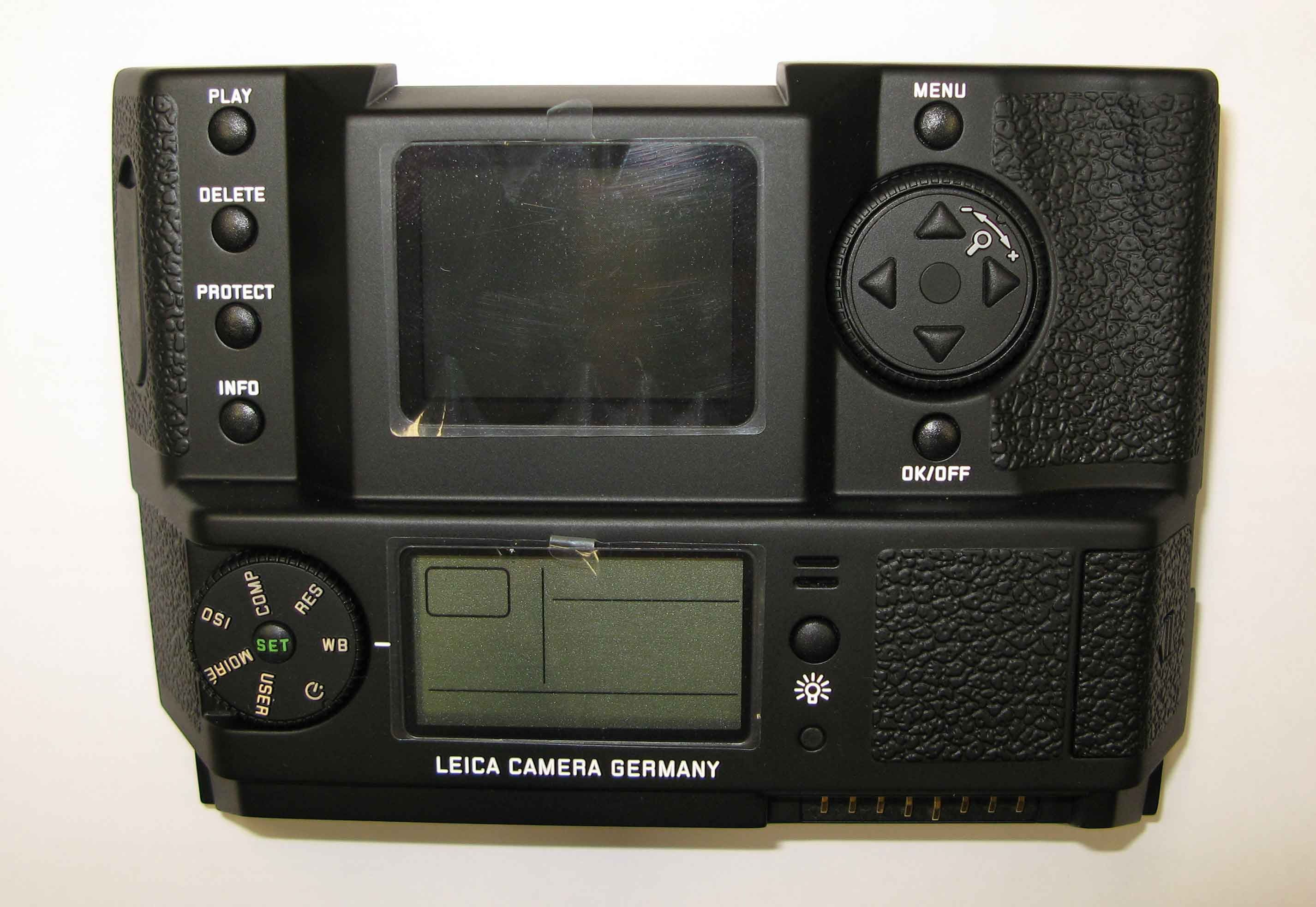 Leica Digital Modul baussen